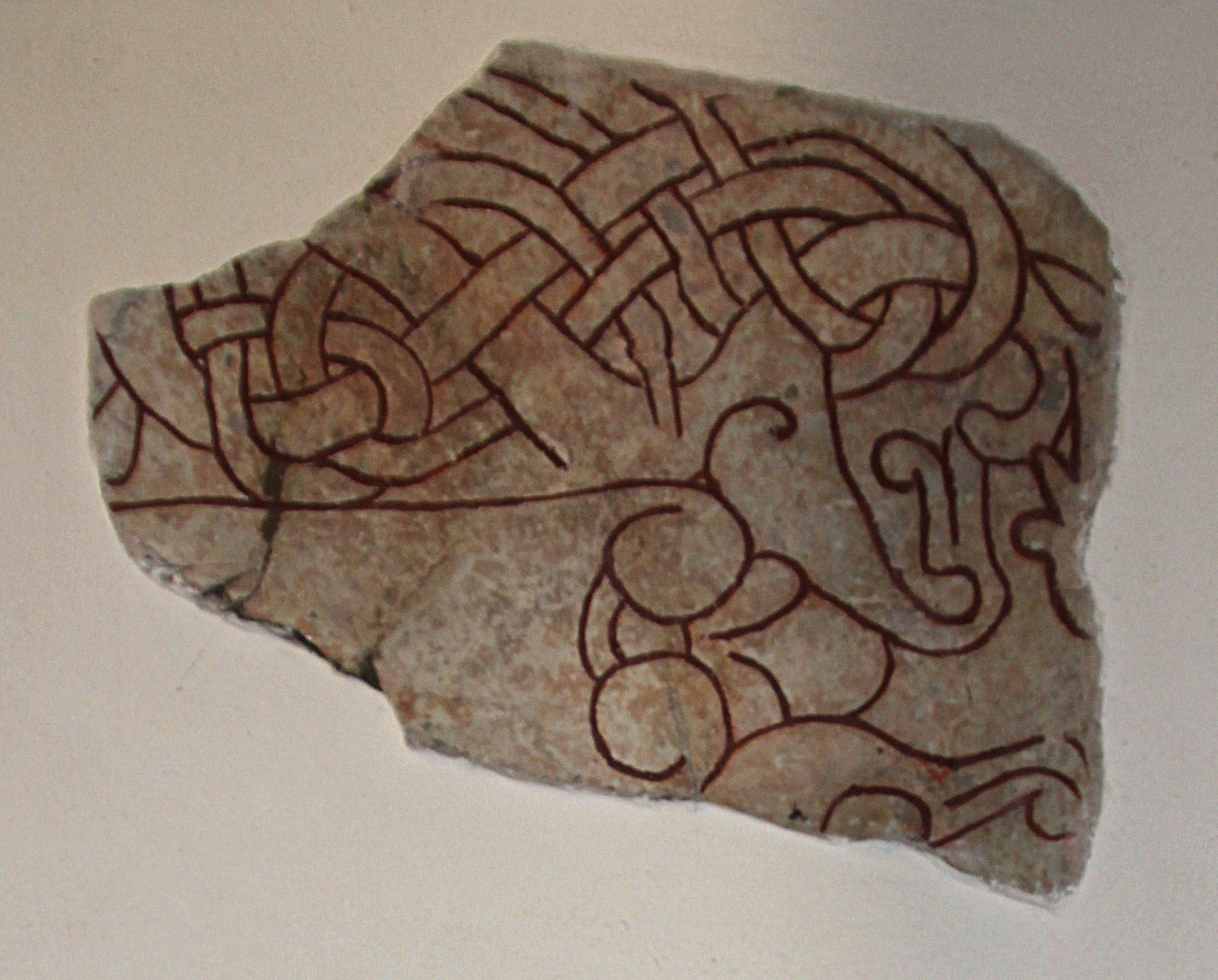 Runstensfragmentet Sö 371 i vapenhuset i Ludgo kyrka, Nyköping. Fragmentet är endast ornamentalt.